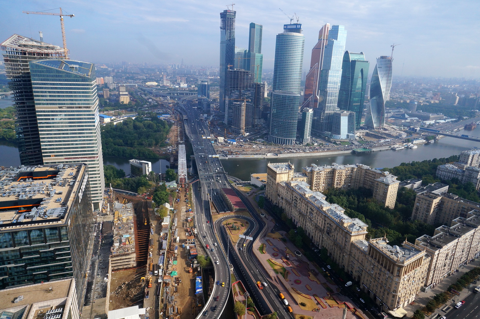 Москва-Сити и ТТК (вид от Кутузовского проспекта)